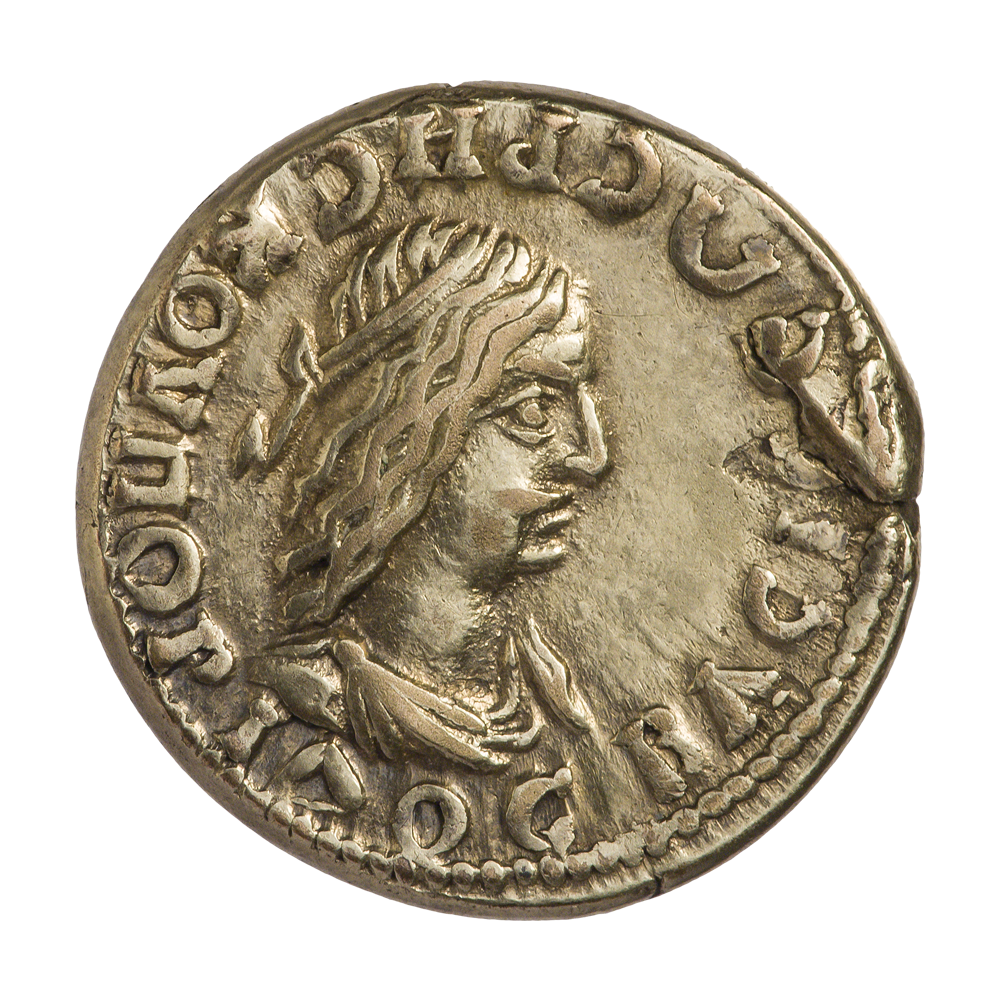 Боспорское царство. Рискупорид III (210—226). Статер. Ок. 223 г. Аверс. Надпись ВАСIΛEωC PHCKOVПOPIΔOC. Бюст Рискупорида III, вправо. Точечный ободок.